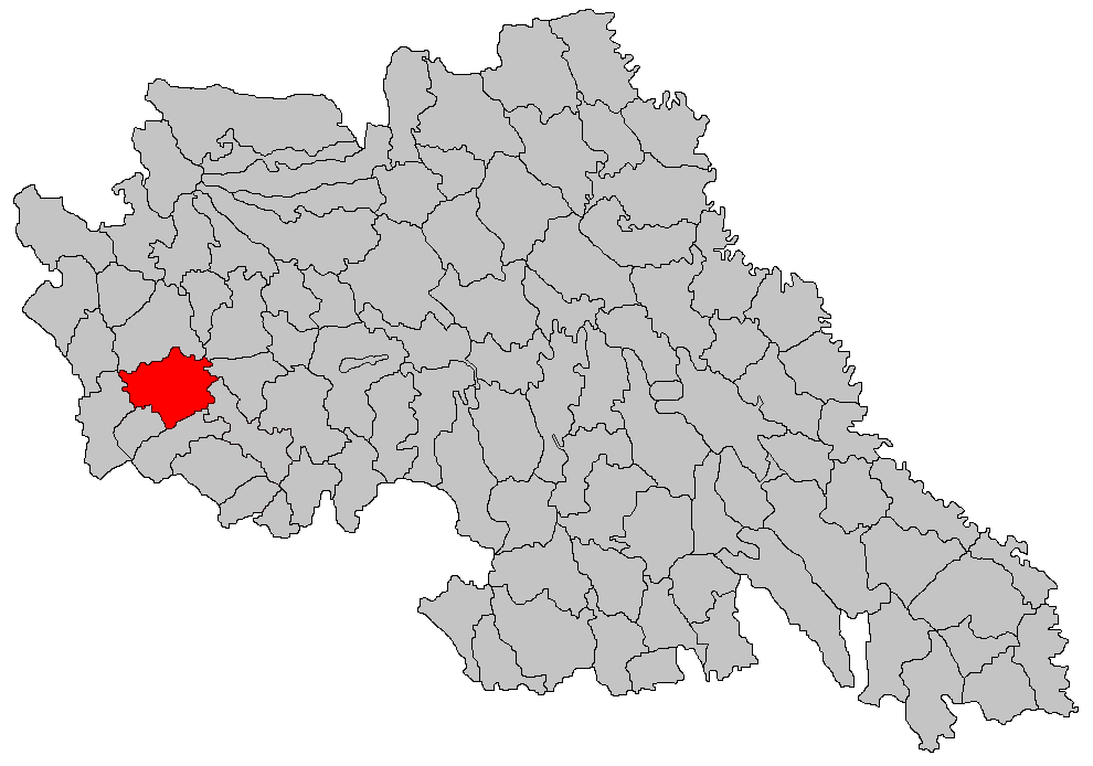 Categorie:Hărţi ale judeţului Iaşi